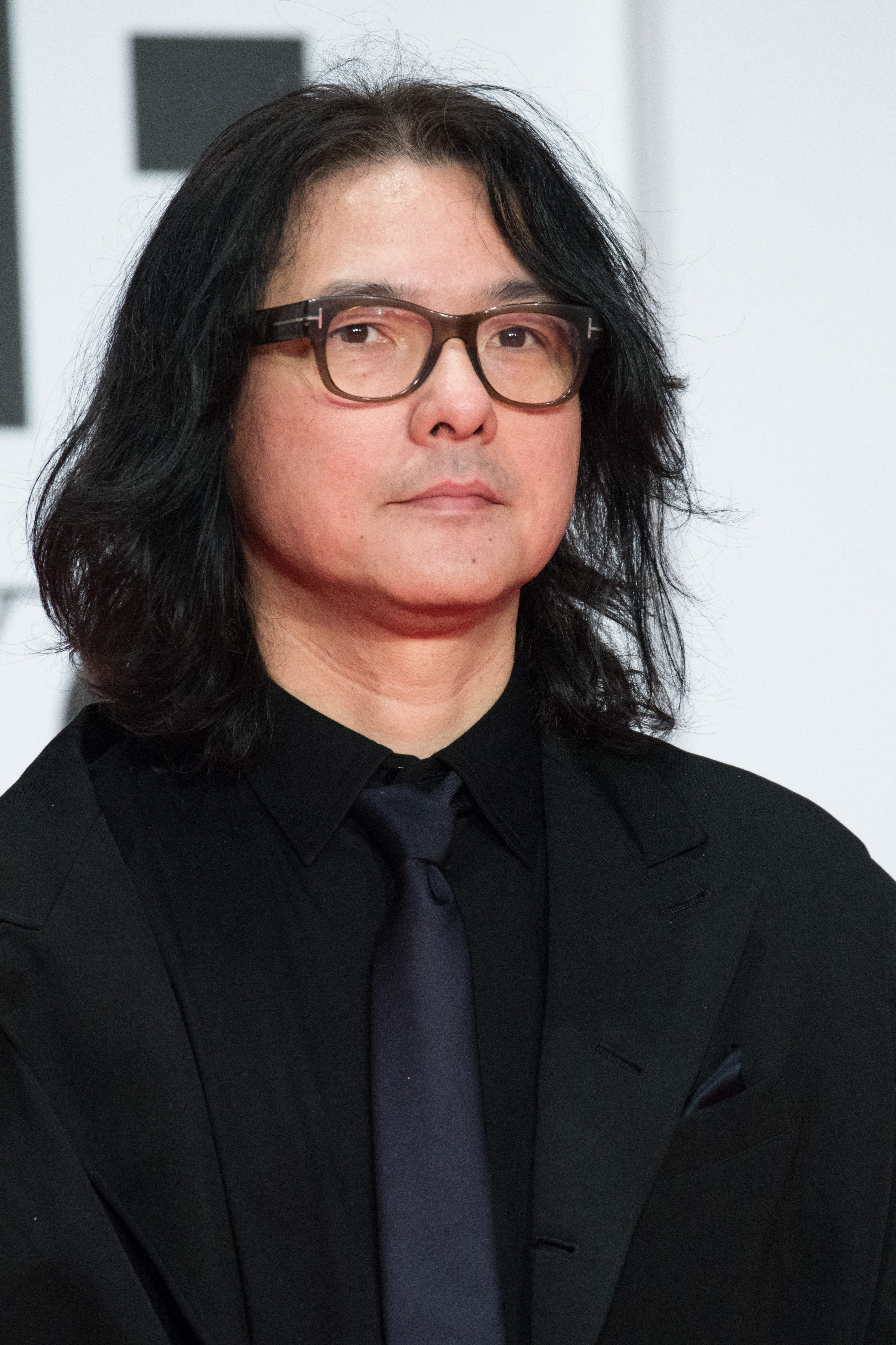 第29回 東京国際映画祭 オープニングセレモニー 岩井俊二 (監督特集 岩井俊二)